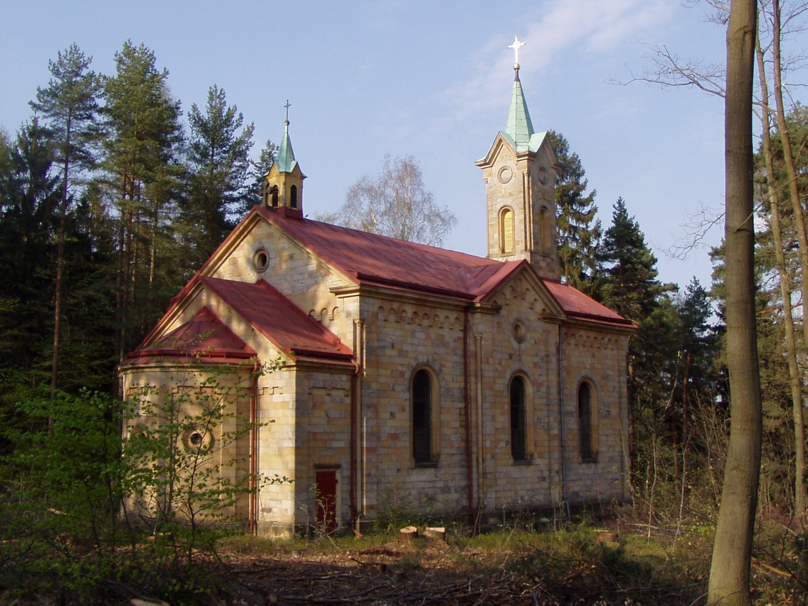 Kostel Navštívení Panny Marie - U Studánky (Kocléřov)